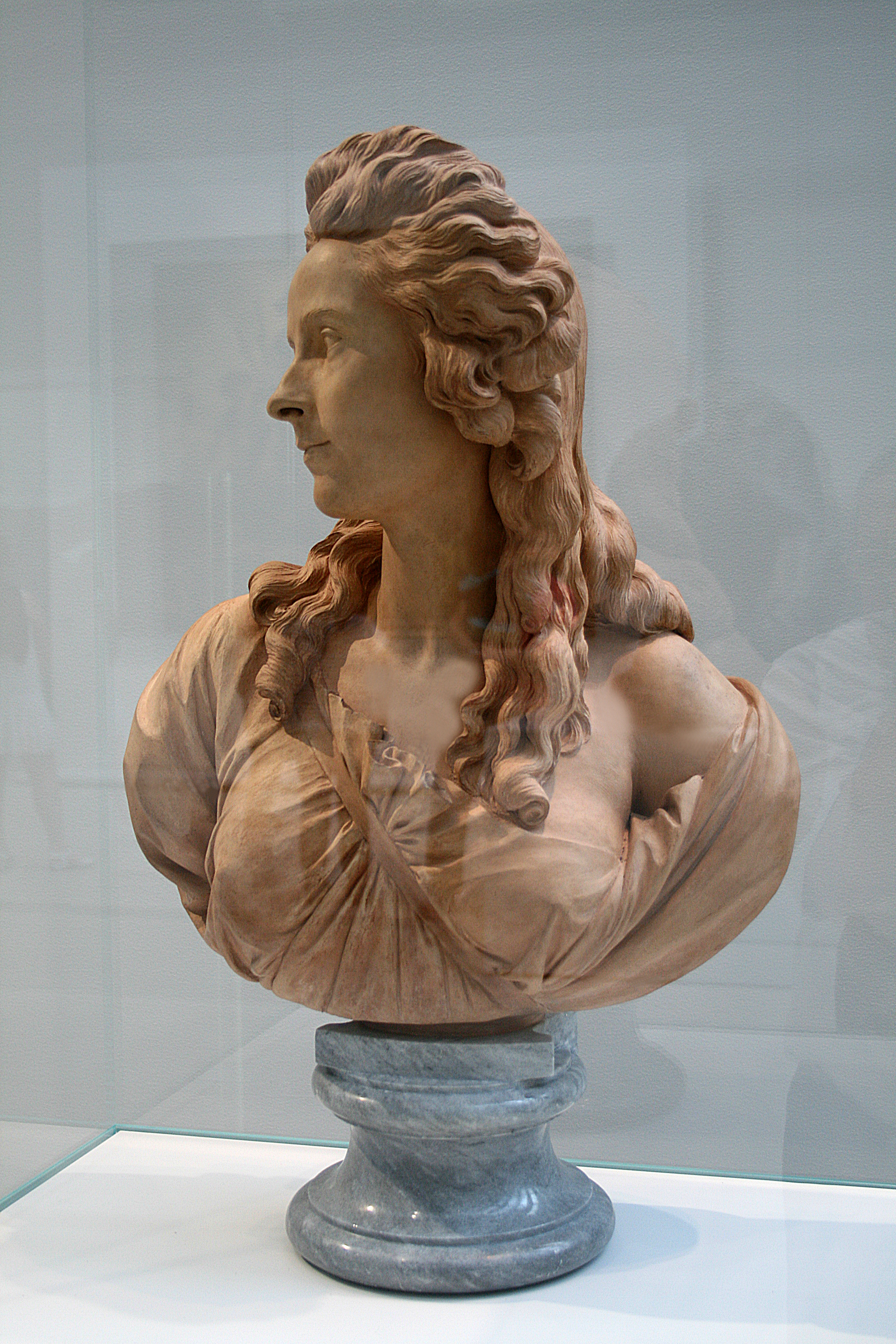 Provenance: France ; Depicted person: Louise Élisabeth Vigée Le Brun